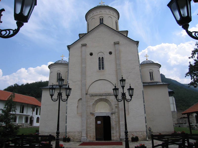 Zapadna strana crkve u manastiru Mileševa